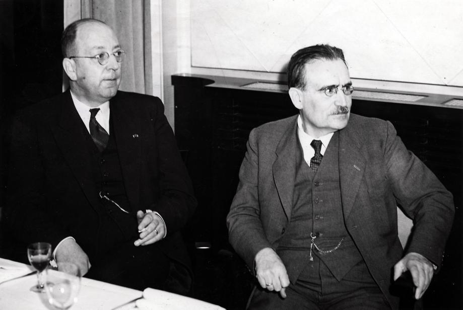 Minister J.H. van Maarseveen (KVP)(rechts) en Minister Willem Drees. Nederland, 3 januari 1949.